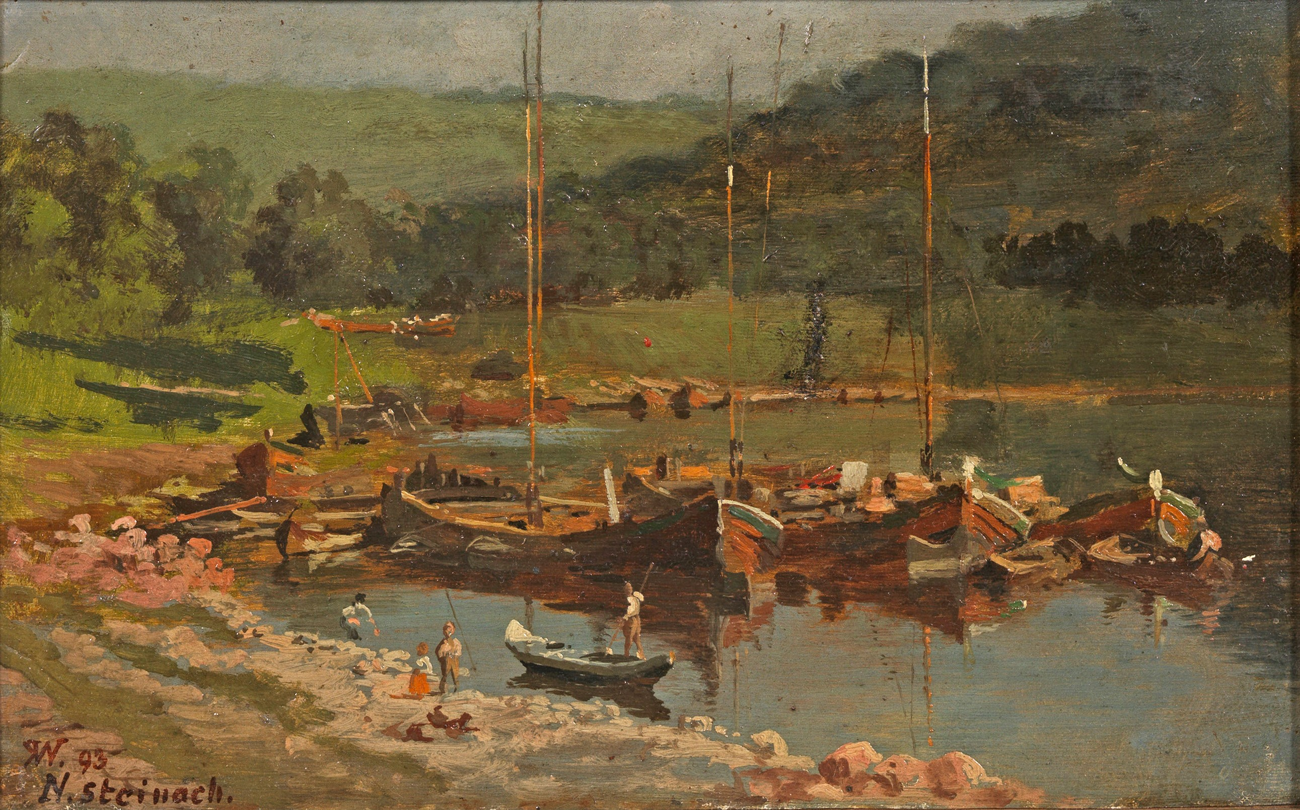 Schiffe in Neckarsteinach